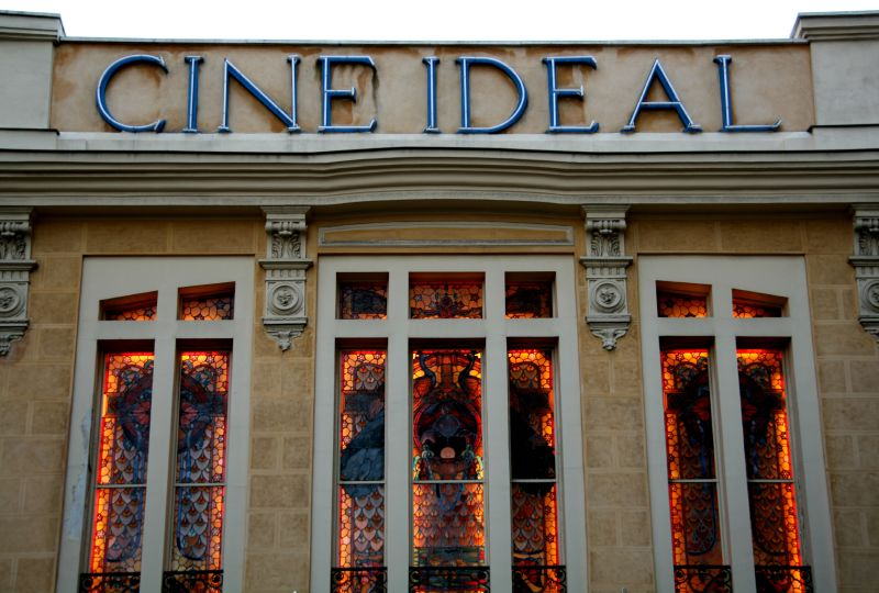 Vidrieras de la fachada del cine Ideal de Madrid (España). Atribuidas al taller de Maumejean.